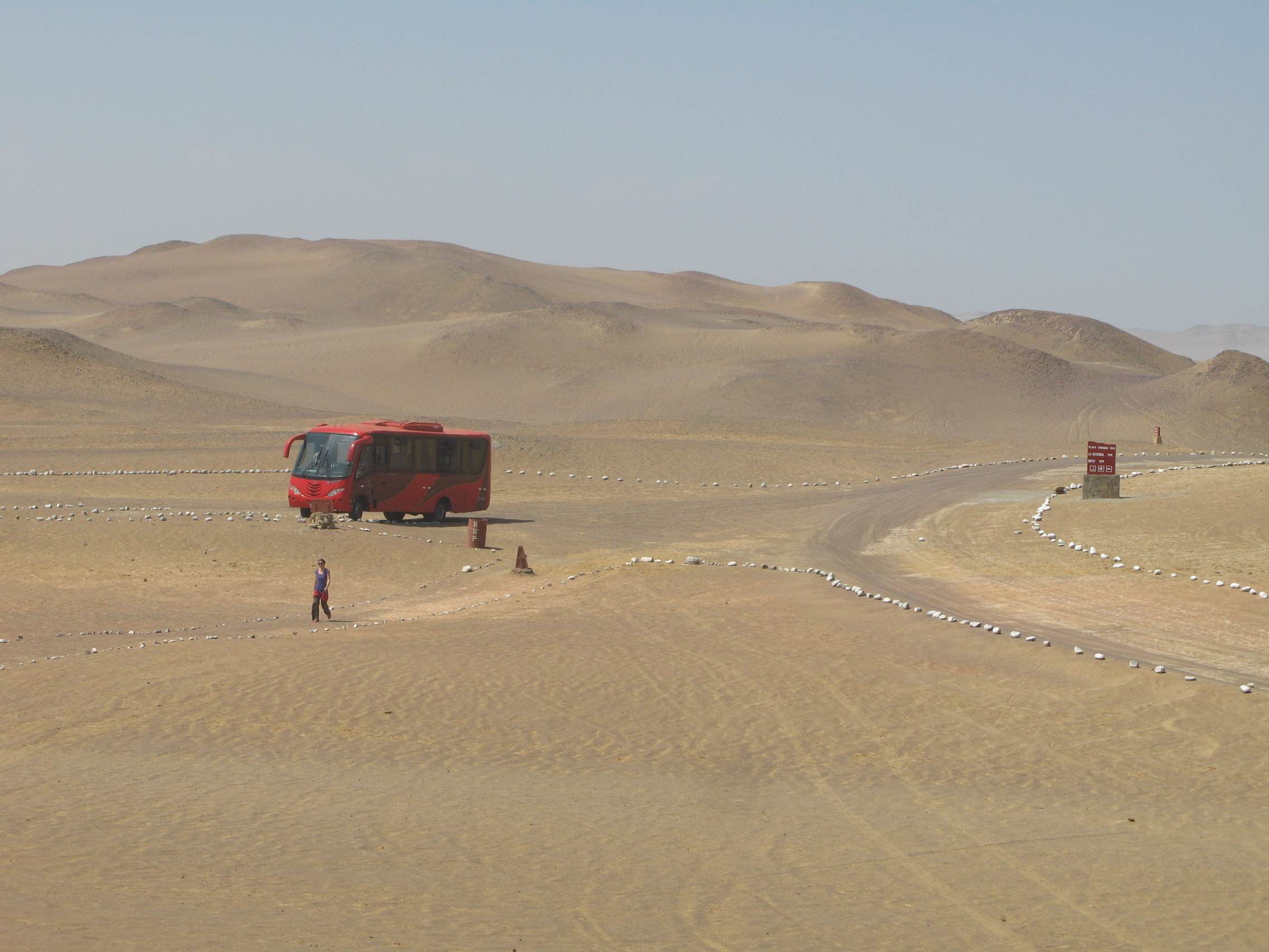 Po nacionalnem rezervatu Paracas je urejen kontroliran dostop